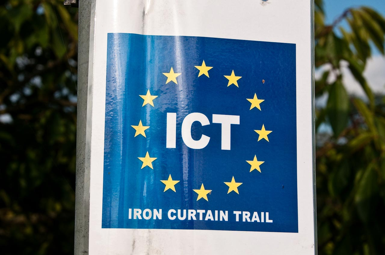 Iron Curtain Trail Schild